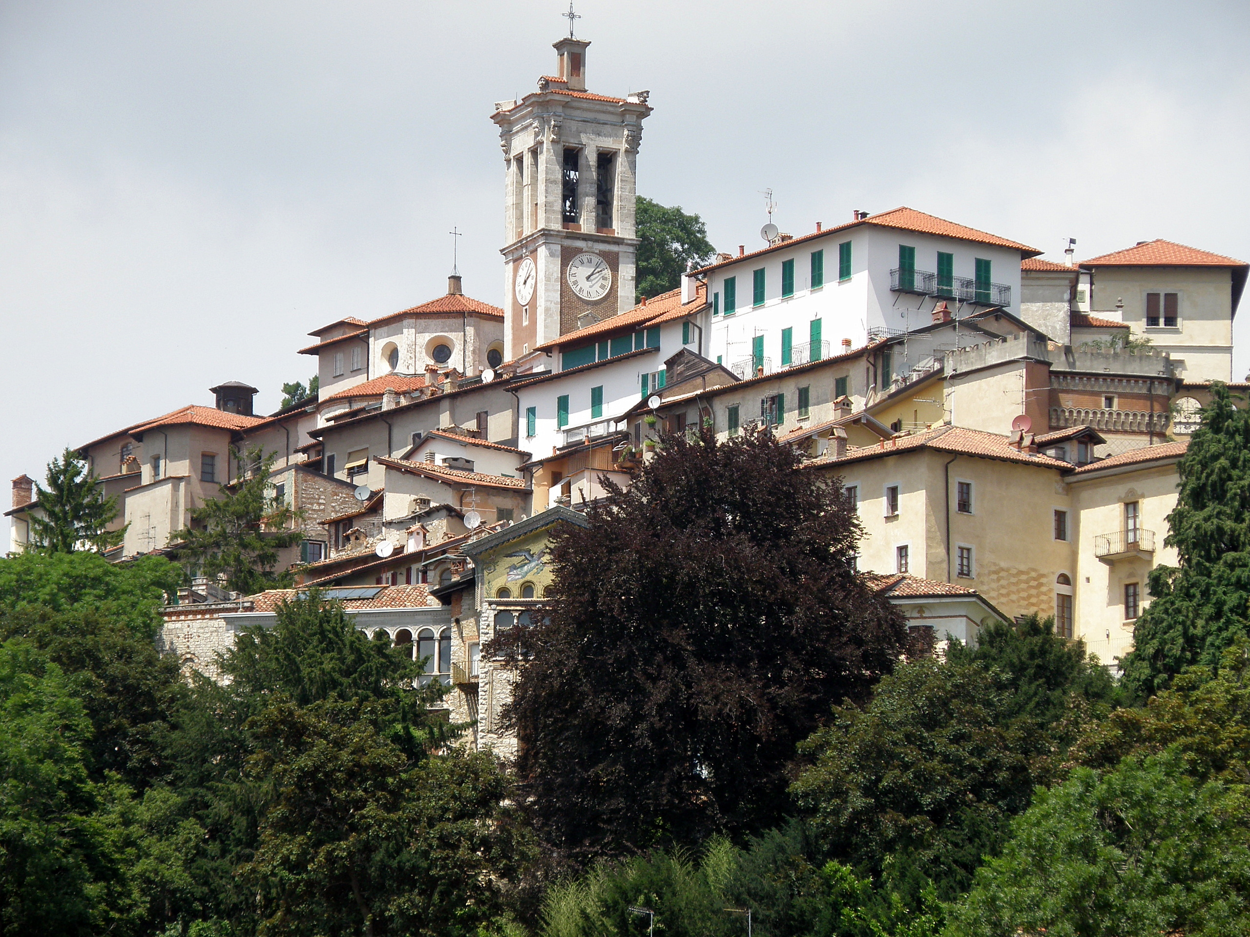 Santa Maria del Monte, frazione de la comm. de Varèse (prov. de VA, région Lombardie).